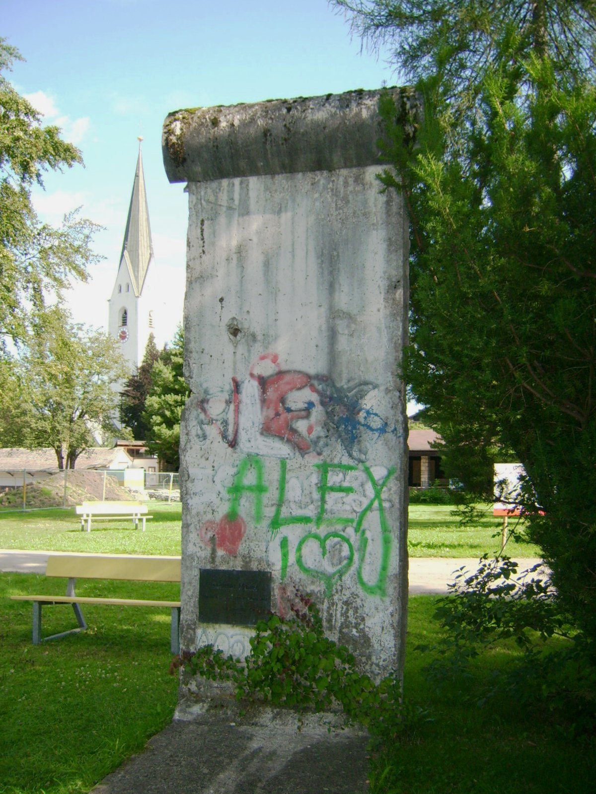 Berliner Mauer in Oberstdorf